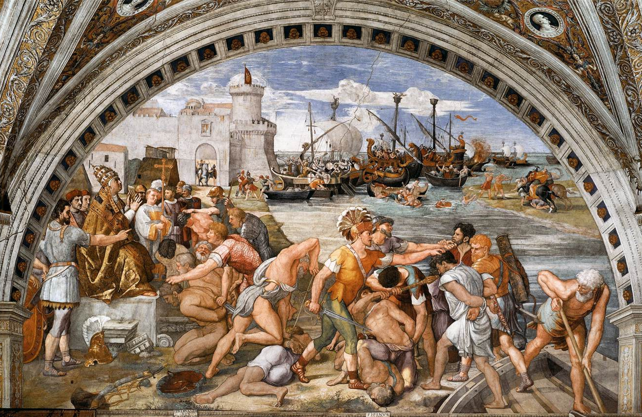 The Battle of Ostia Fresco, width at base 770 cm Stanza dell'Incendio di Borgo, Palazzi Pontifici, Vatican